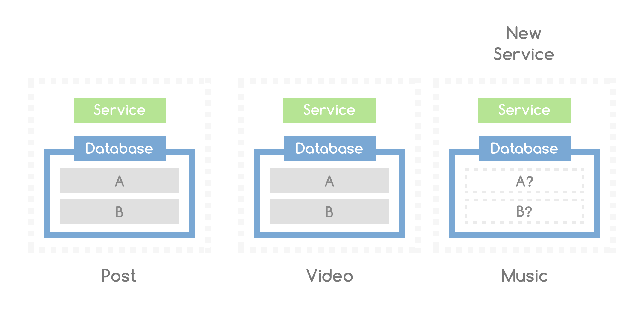 微服務中的資料庫結構規劃，然而另一個是新的服務，但他並沒有資料，這個時候要從其他地方同步資料到這個新服務。